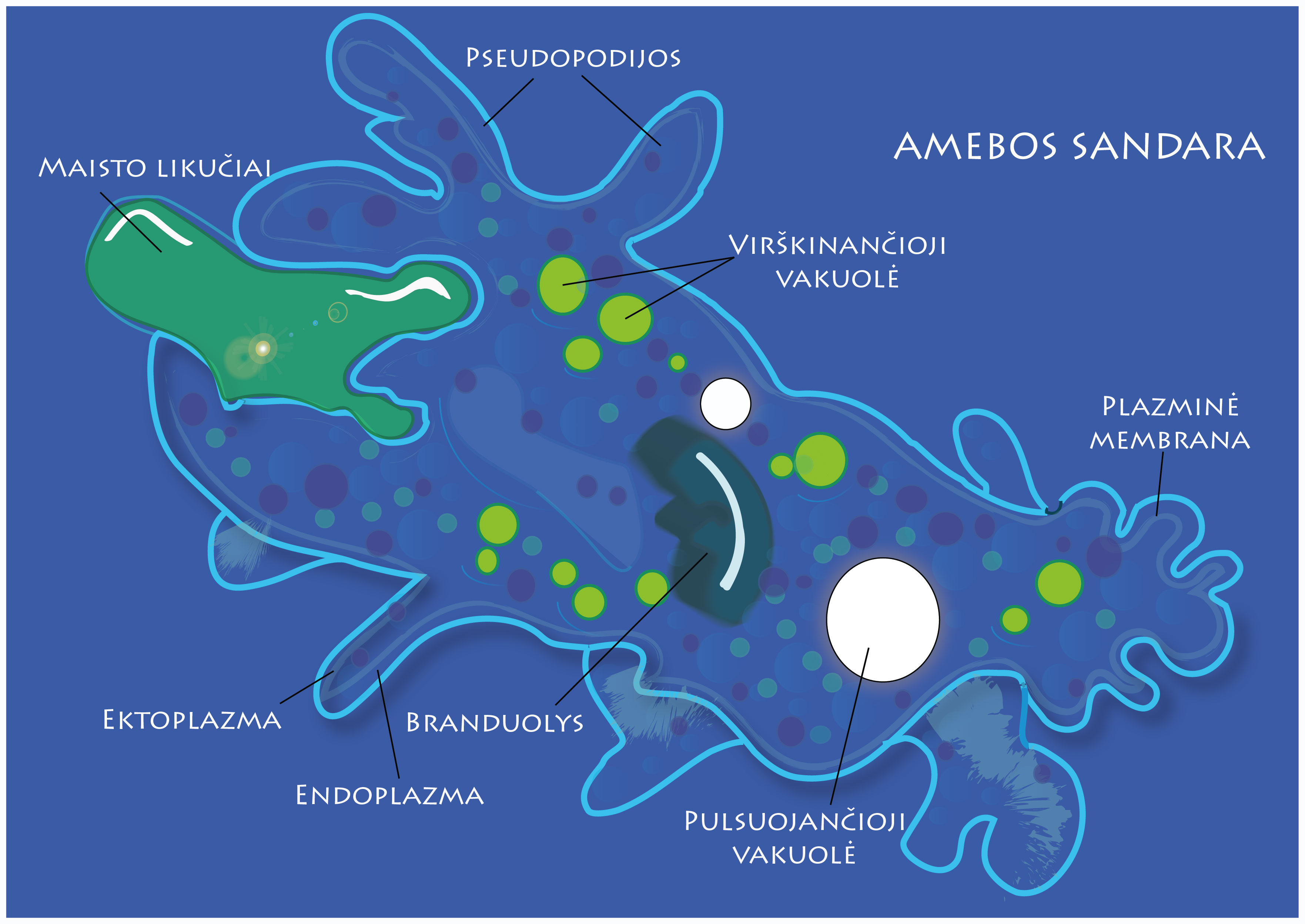 Amebos sandara